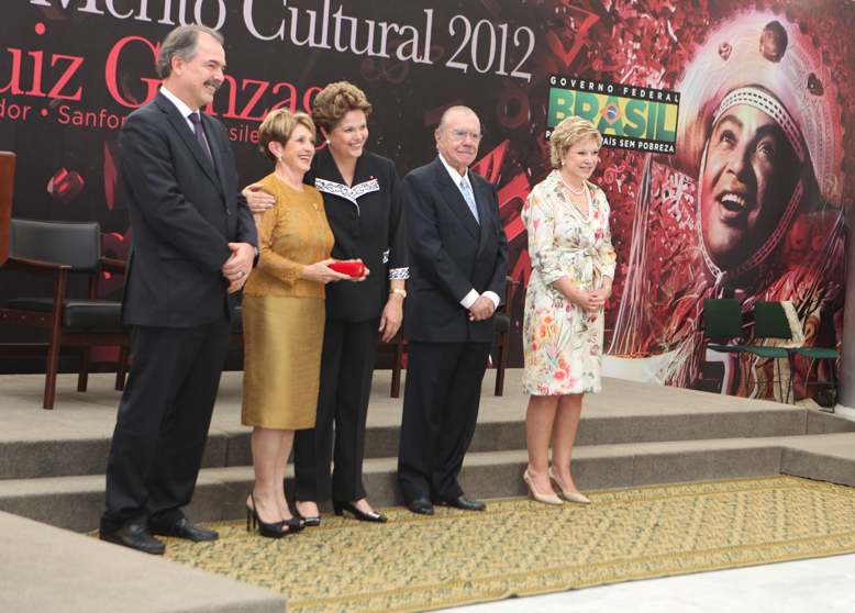 Cleodes Maria Piazza sendo agraciada com a insígnia da Ordem do Mérito Cultural Foto: Elisabete Alves